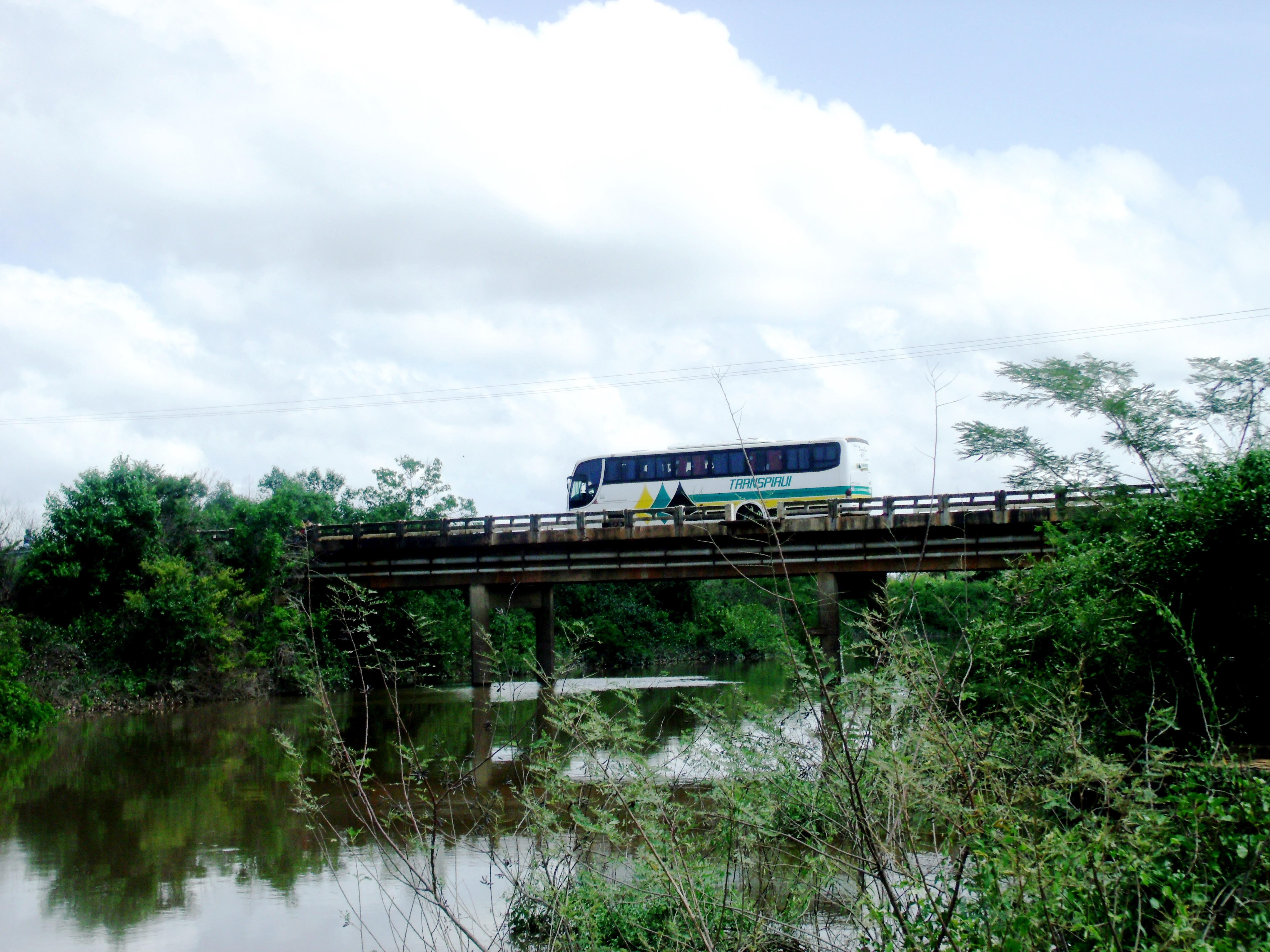 Vista da ponte sobre o Rio Surubim em Campo Maior, Piauí, Brasil. Em cima, passando um veículo ônibus da Viação Trans Piauí.